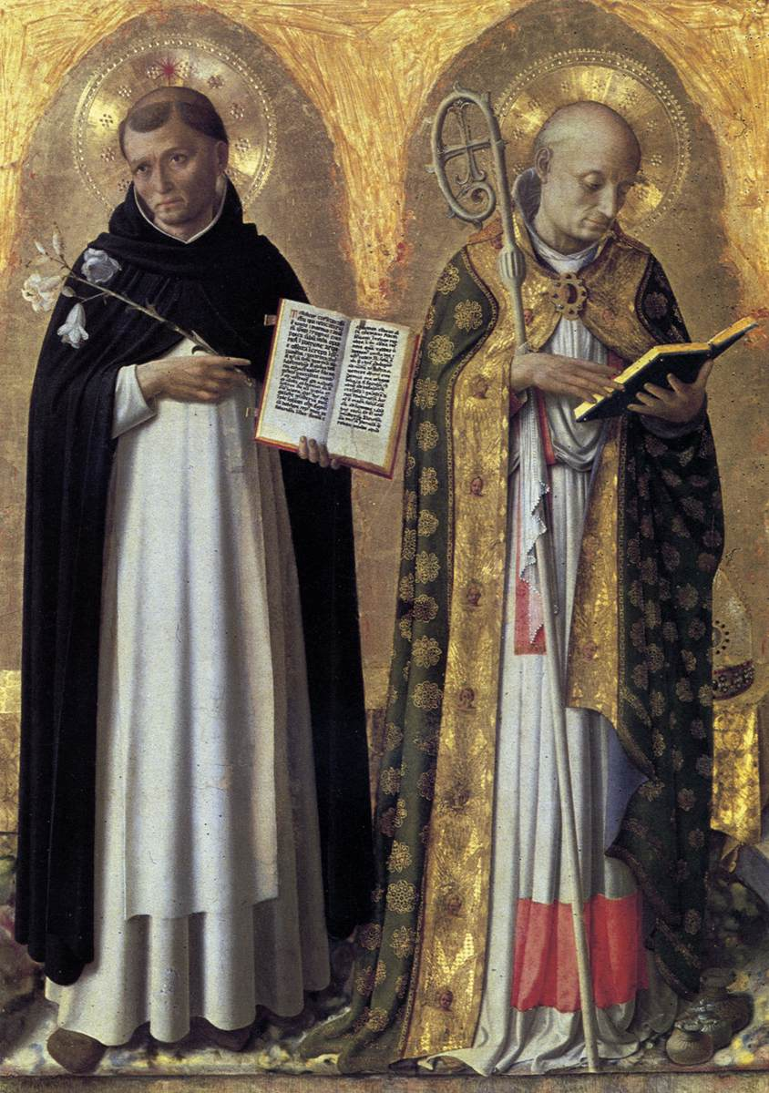 Perugia Altarpiece Tempera on panel, 95 x 73 cm